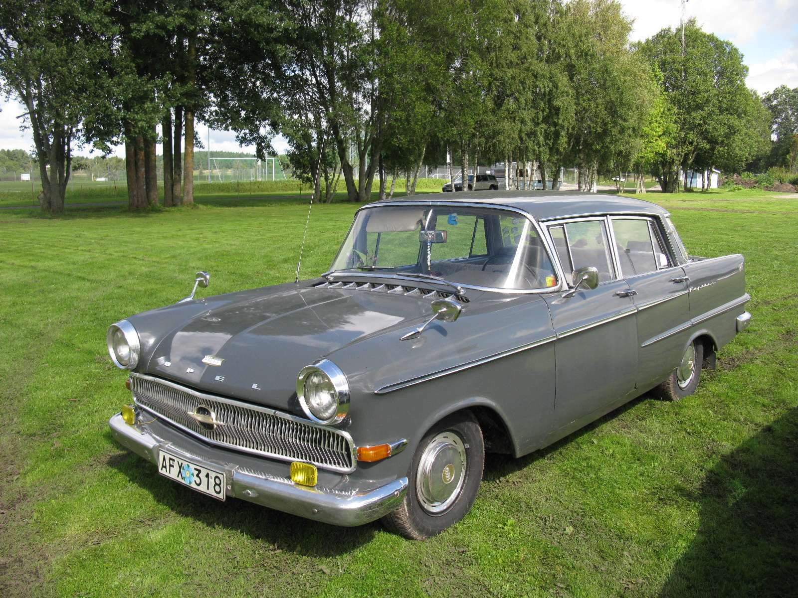 1962 Opel Kapitän